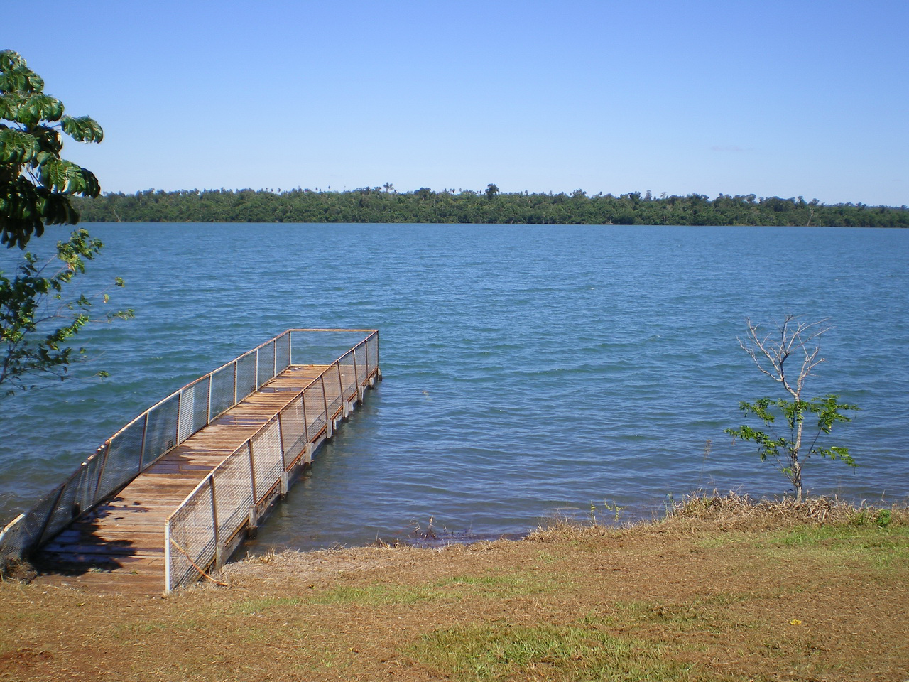 Fotos de los refugios y reservas de Itaipu, tomadas en los años 2007 y 2008 por mí Reserva de Itabo